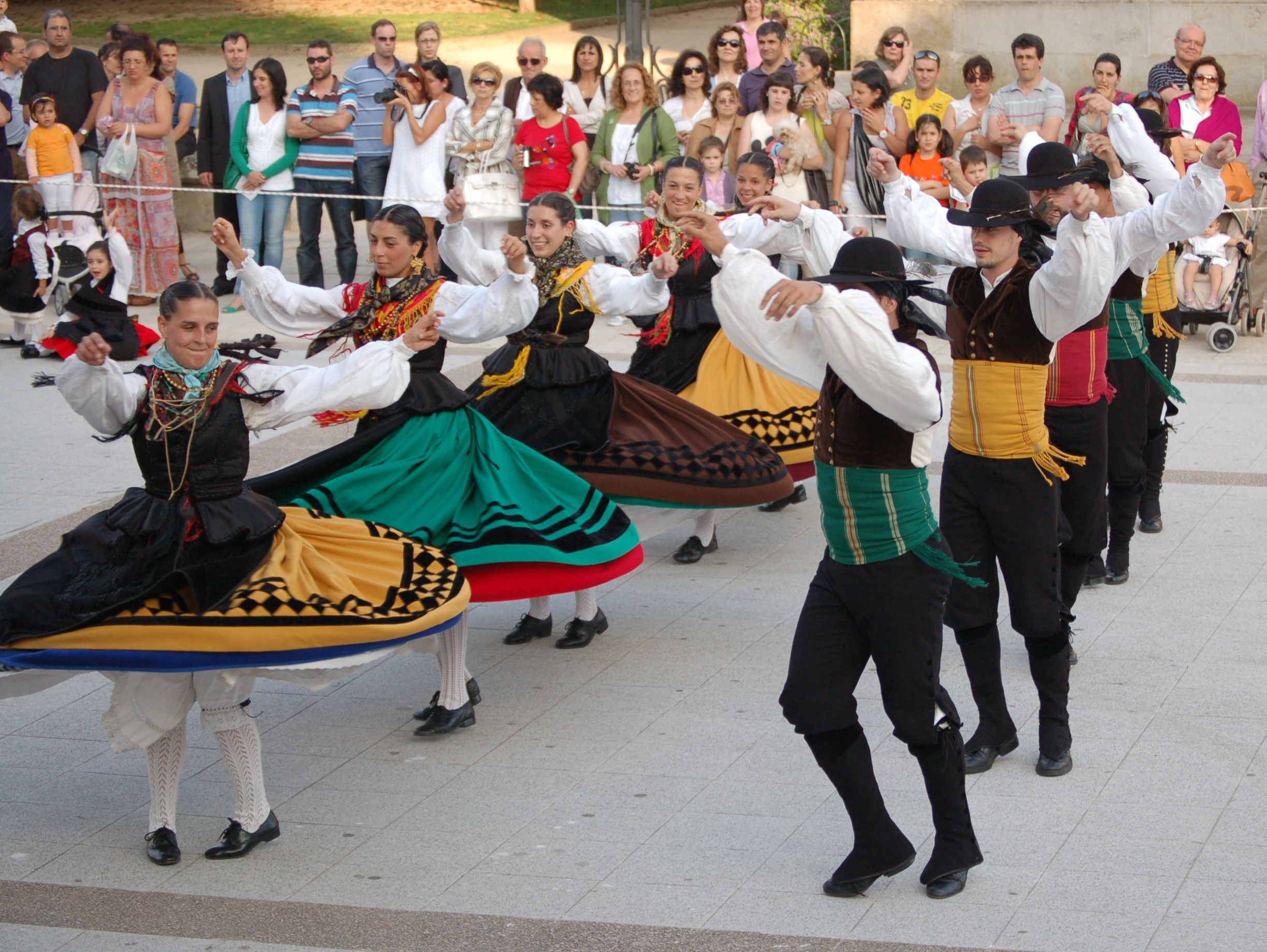 Baile dunha muiñeira no XXXIX día da Muiñeira de Pontevedra, celebrado na avenida de Montero Ríos